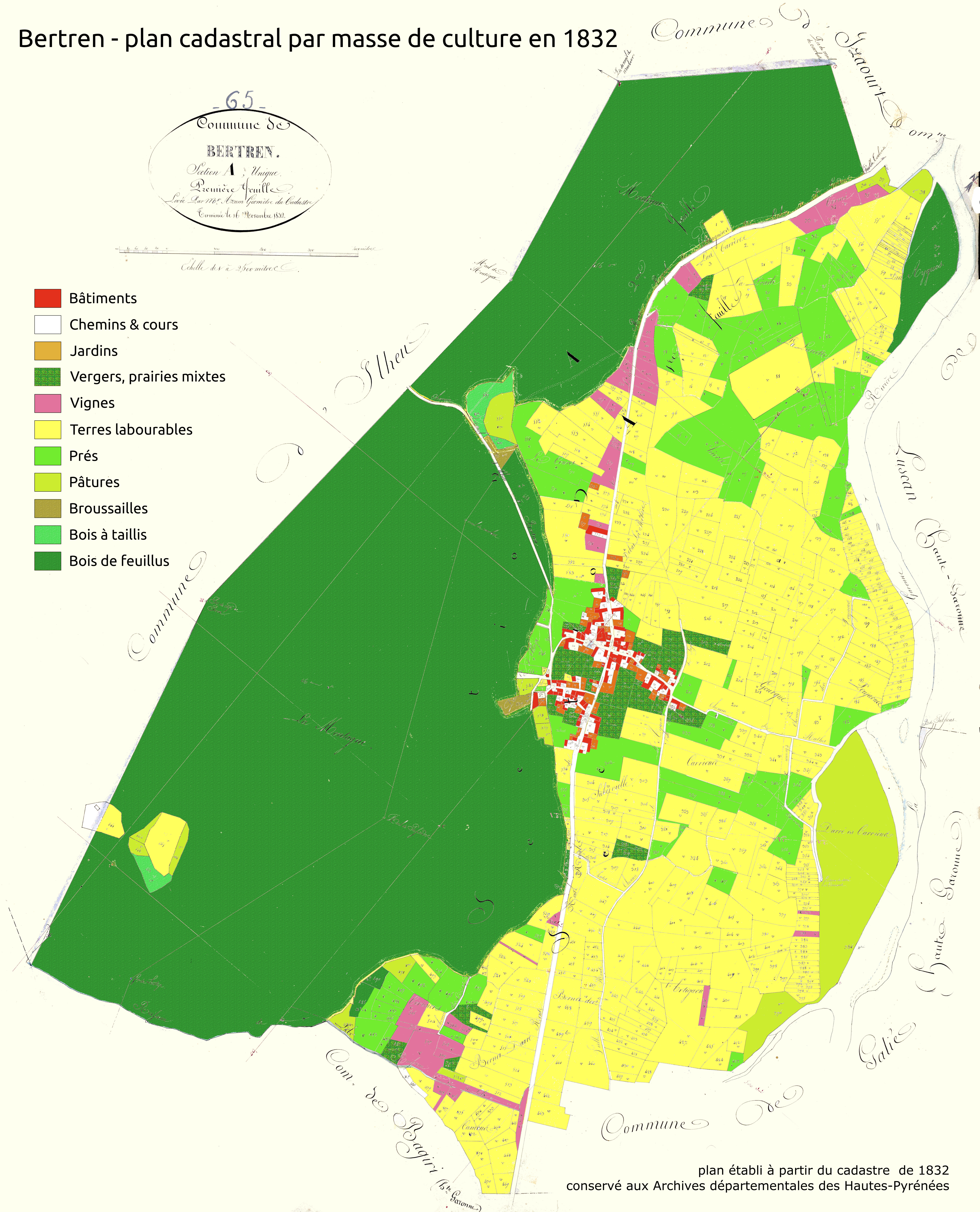 Commune de Bertren (Hautes-Pyrénées) - plan de masse des cultures en 1832. Travail personnel à partir du plan cadastral de 1832 conservé aux Archives départementales des Hautes-Pyrénées